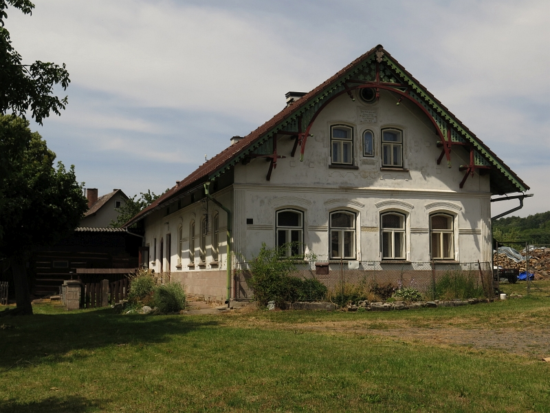 Usedlost čp. 5, Tuhaň 5, Tuhaň (Stružinec).